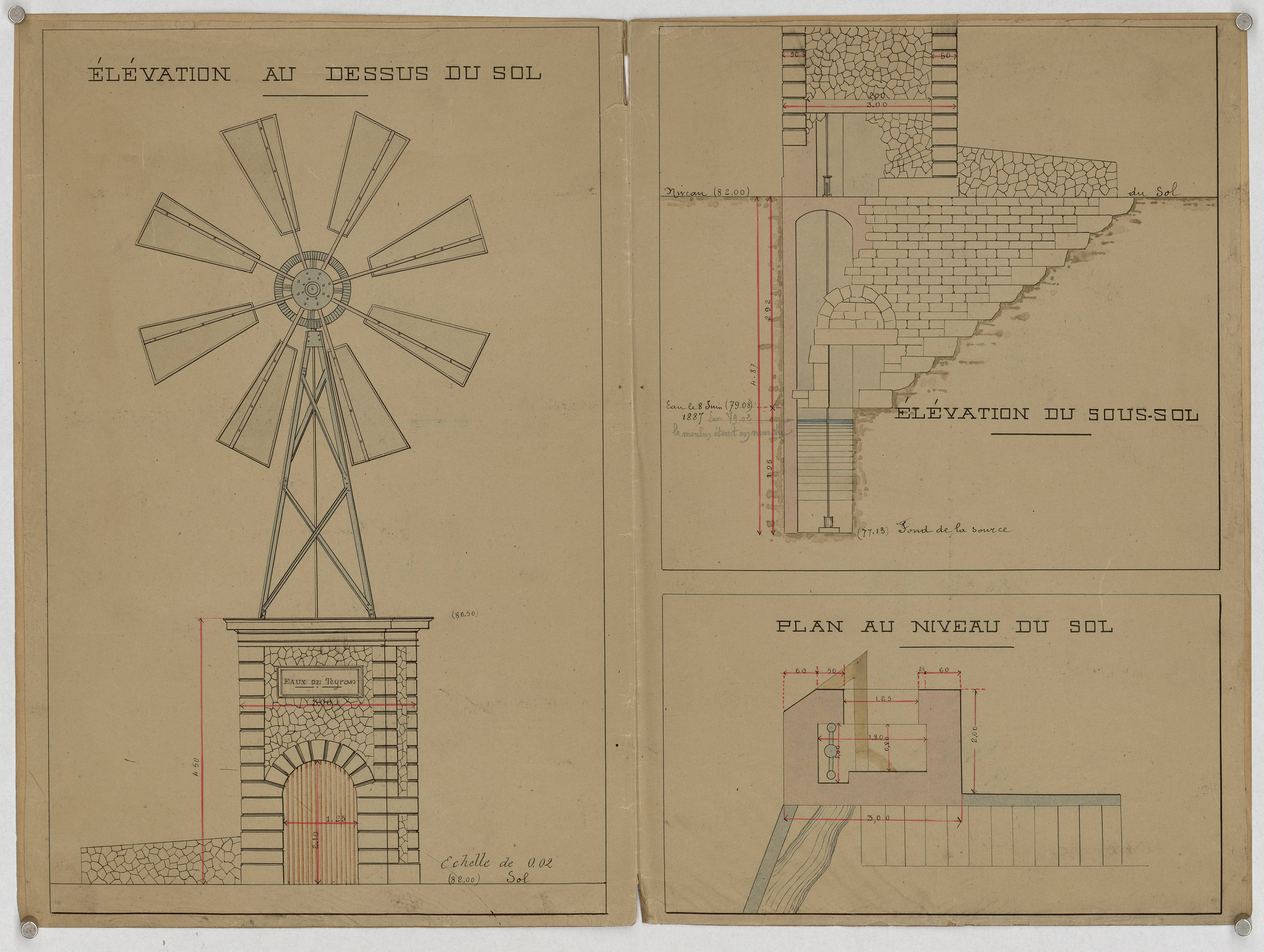 Teyran. - Projet de distribution d'eau : plan, élévation et coupe du moulin à vent.